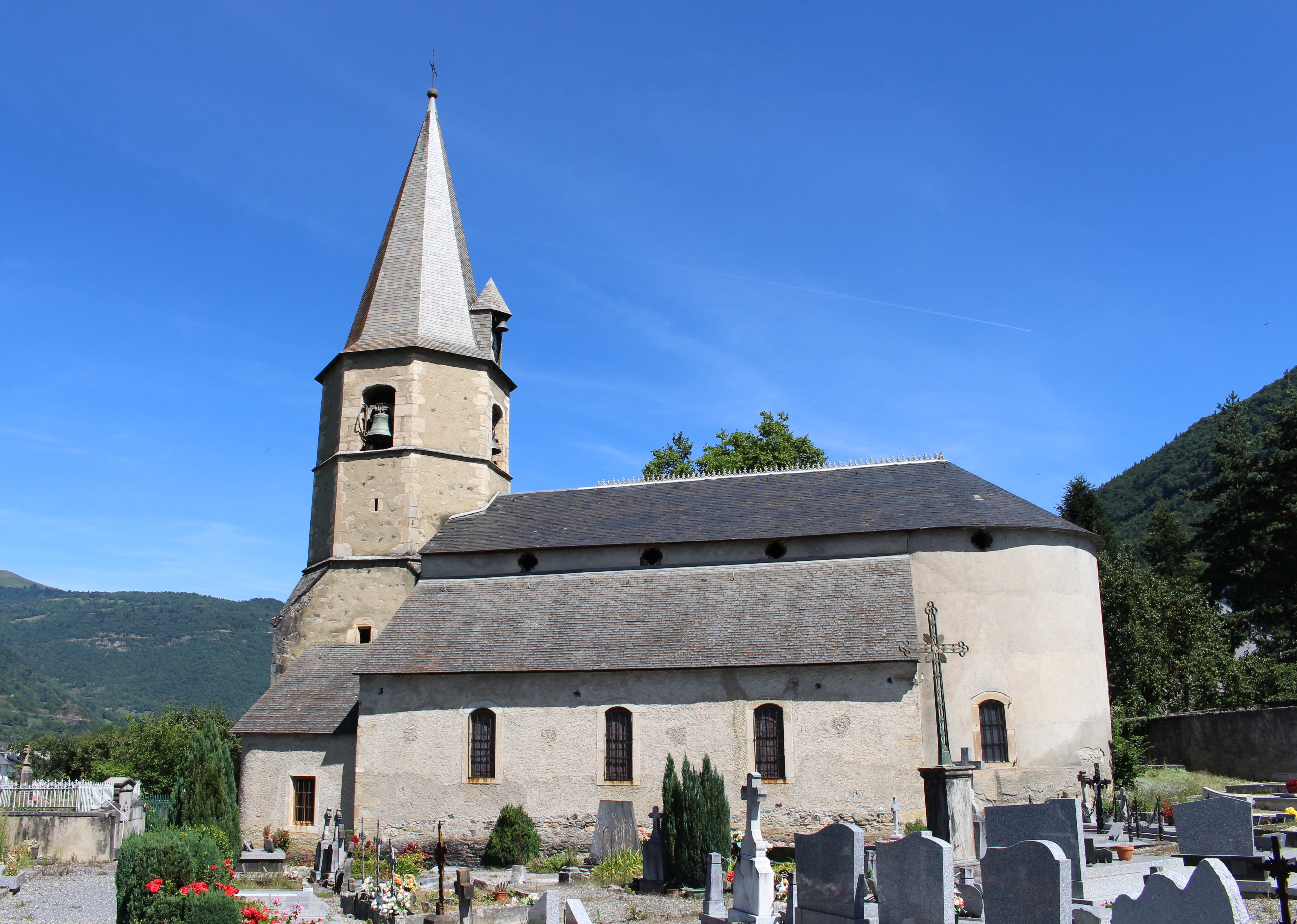 Église Saint-Marcel de Guchan (Hautes-Pyrénées)